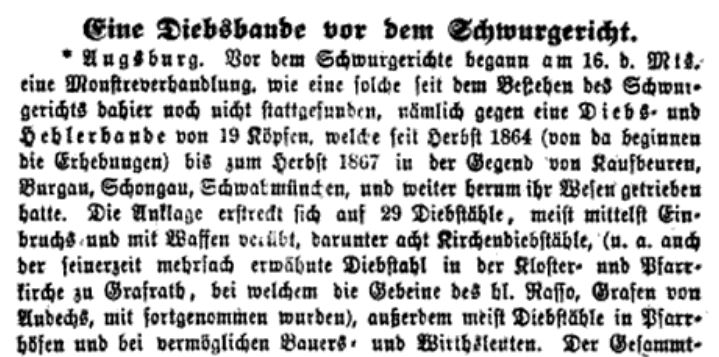 Zeitungsbericht vom 20. März 1869 über die Verhandlung des Schwurgerichts Augsburg über die Vergehen der Rassobande